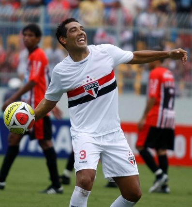 André Dias em ação no São Paulo Futebol Clube em 2010